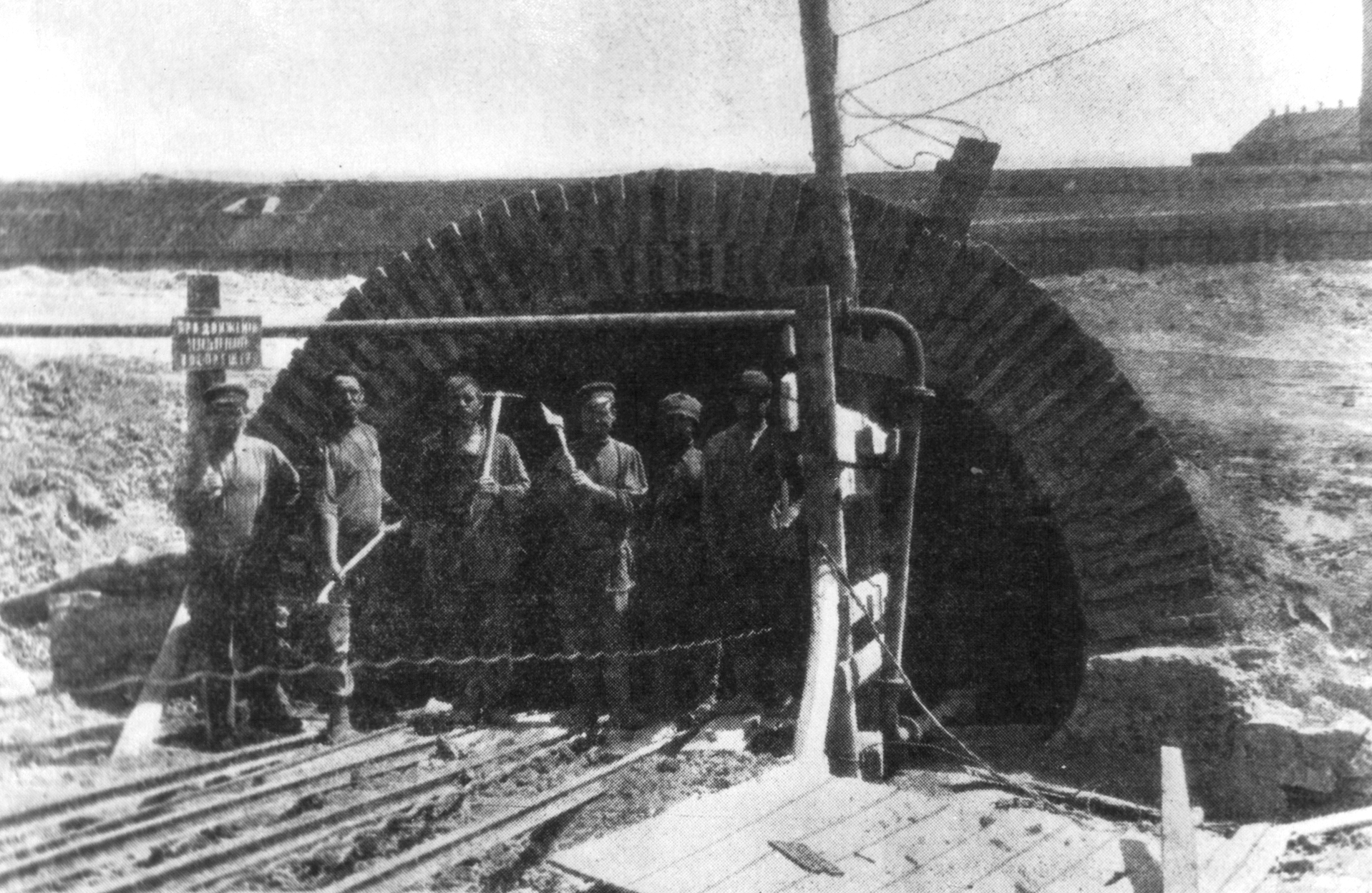 Шахта Софія. «Товариство ртутного виробництва «О. Ауербах і Ко». Фото початку ХХ ст.